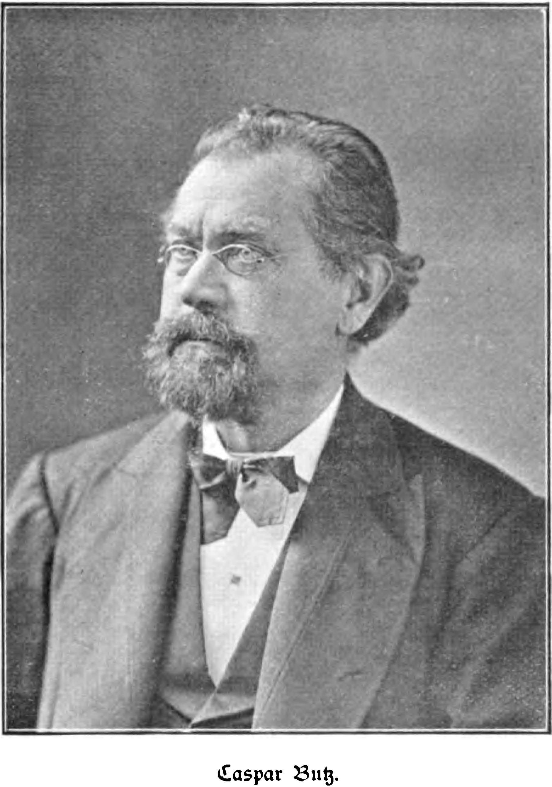 Porträt Caspar Butz (1825-1885) Aus: Gustav Adolf Zimmermann: Deutsch in Amerika. Beiträge zur Geschichte der Deutsch-amerikanischen Literatur. Biographieen der deutsch - amerikanischen Dichter nebst Auswahl ihrer Dichtungen, mit 10 Portraits. Herausgegeben vom „Germania Männerchor“ in Chicago. Ackermann & Eyller, Chicago 1892